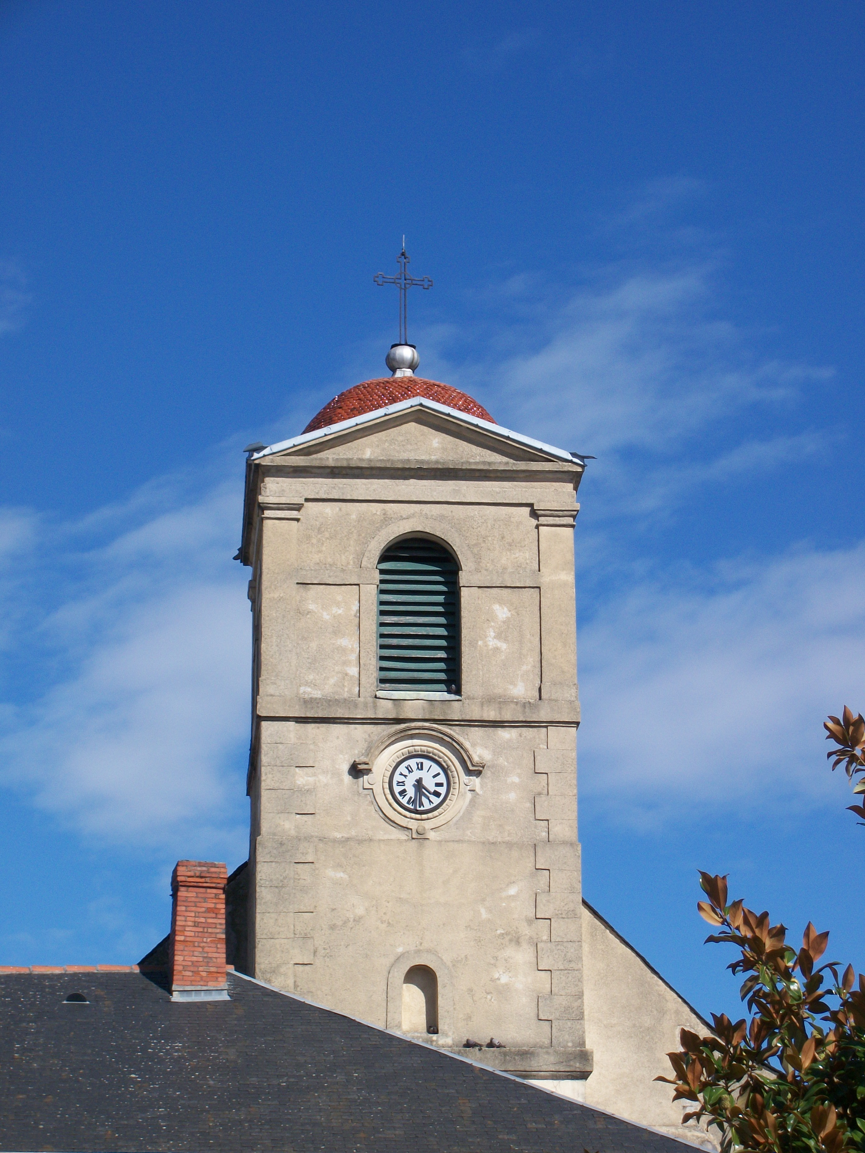 Clocher de l'église Saint-Gérin d'Aureilhan (Hautes-Pyrénées, France)